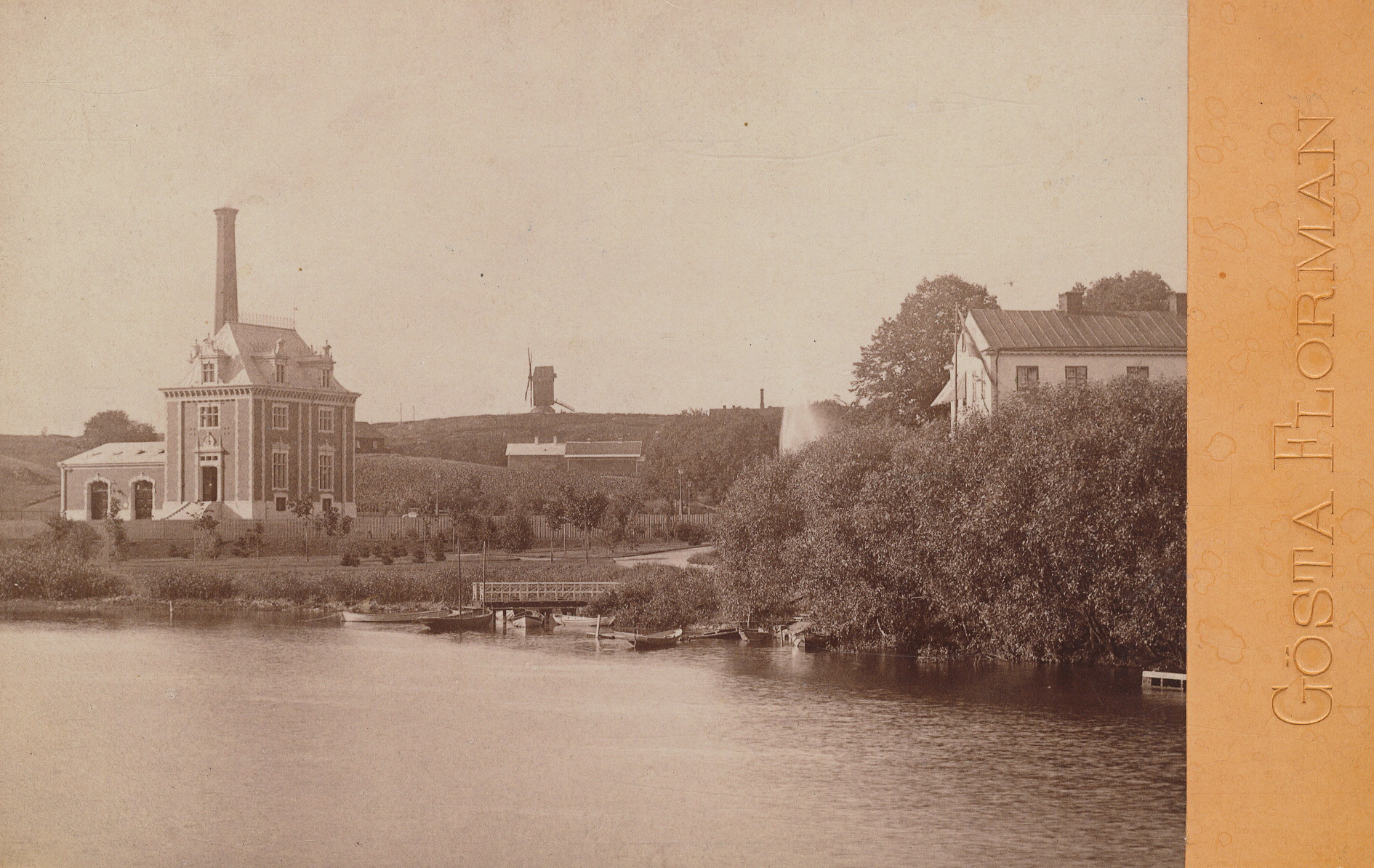 Eriksdalsverket